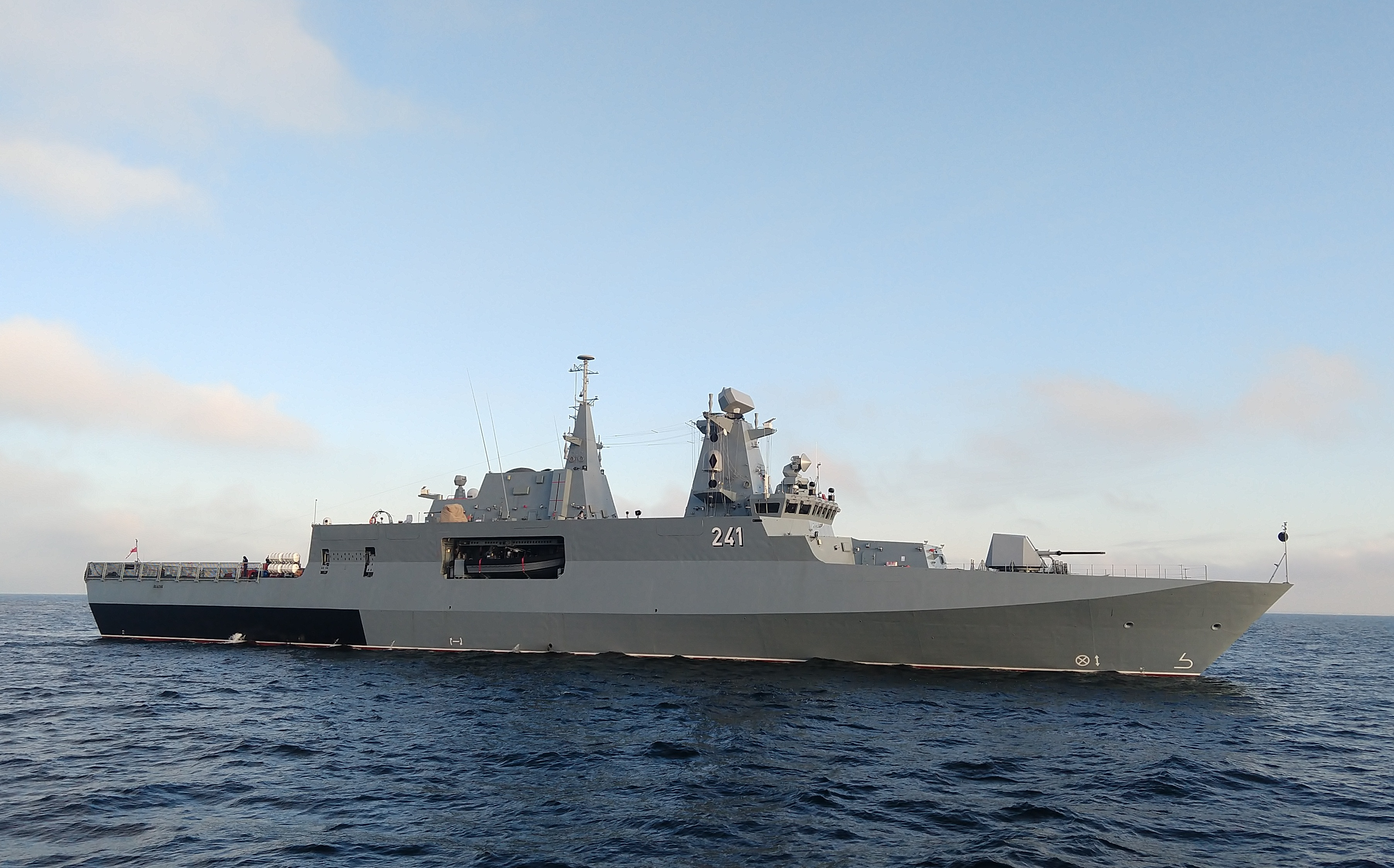 ORP „Ślązak” podczas prób stoczniowych na Zatoce Gdańskiej.